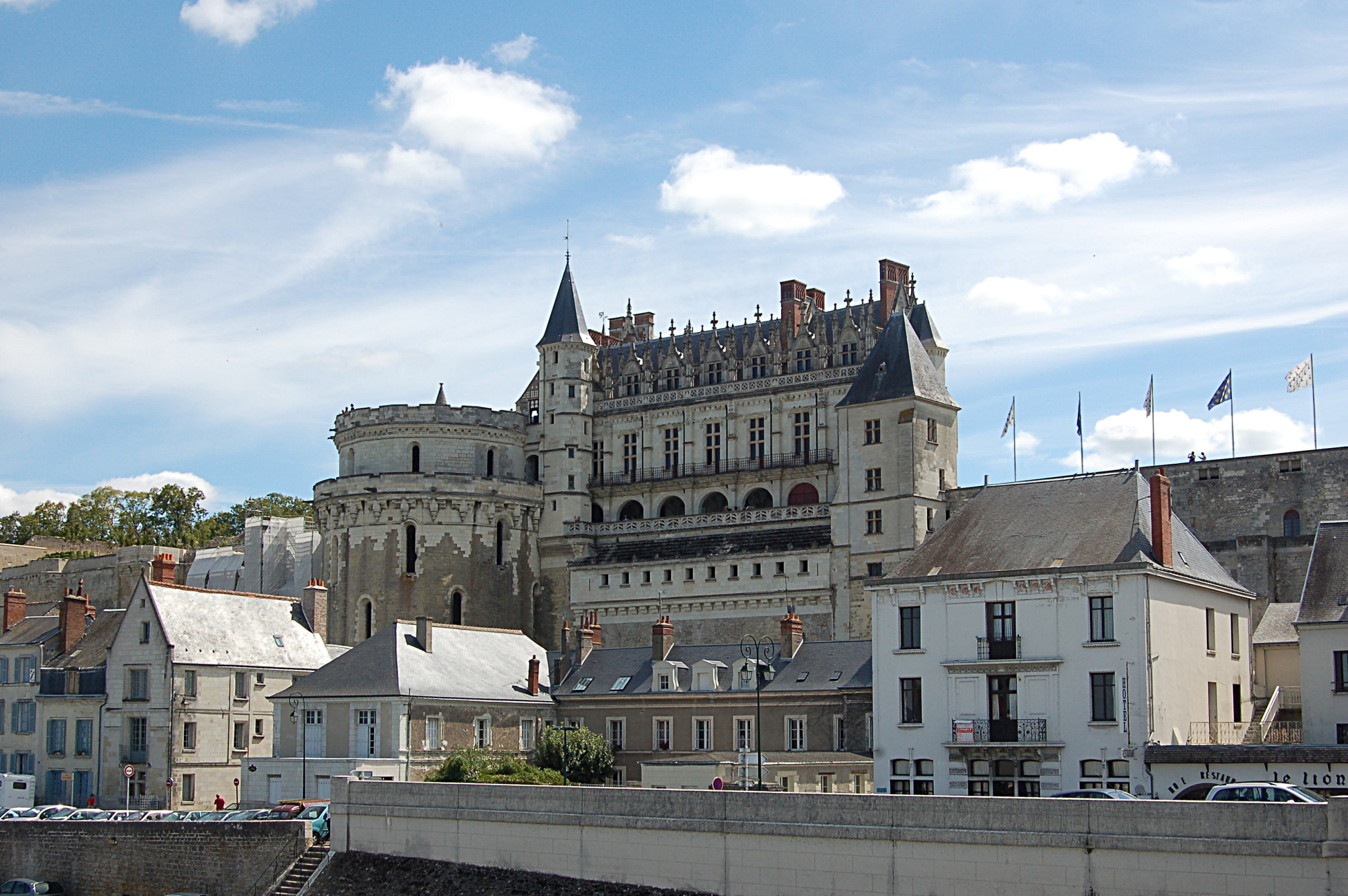 Schloss Amboise